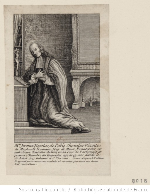 Nicolas de Pâris vicomte Machault conseiller au parlement publié en 1908.